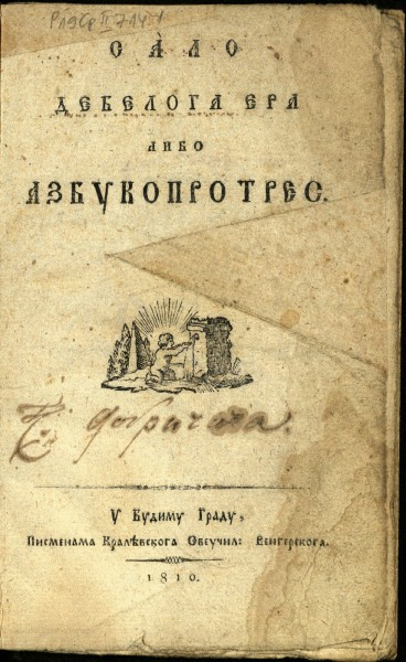 Српски (ћирилица): Српски језик,. Правопис, Мркаљ, Сава, Сало дебелога јера либо азбукопротрес, Славено-србска печатња Краљевскаго всеучилишта венгерскаго, Будим 1810.